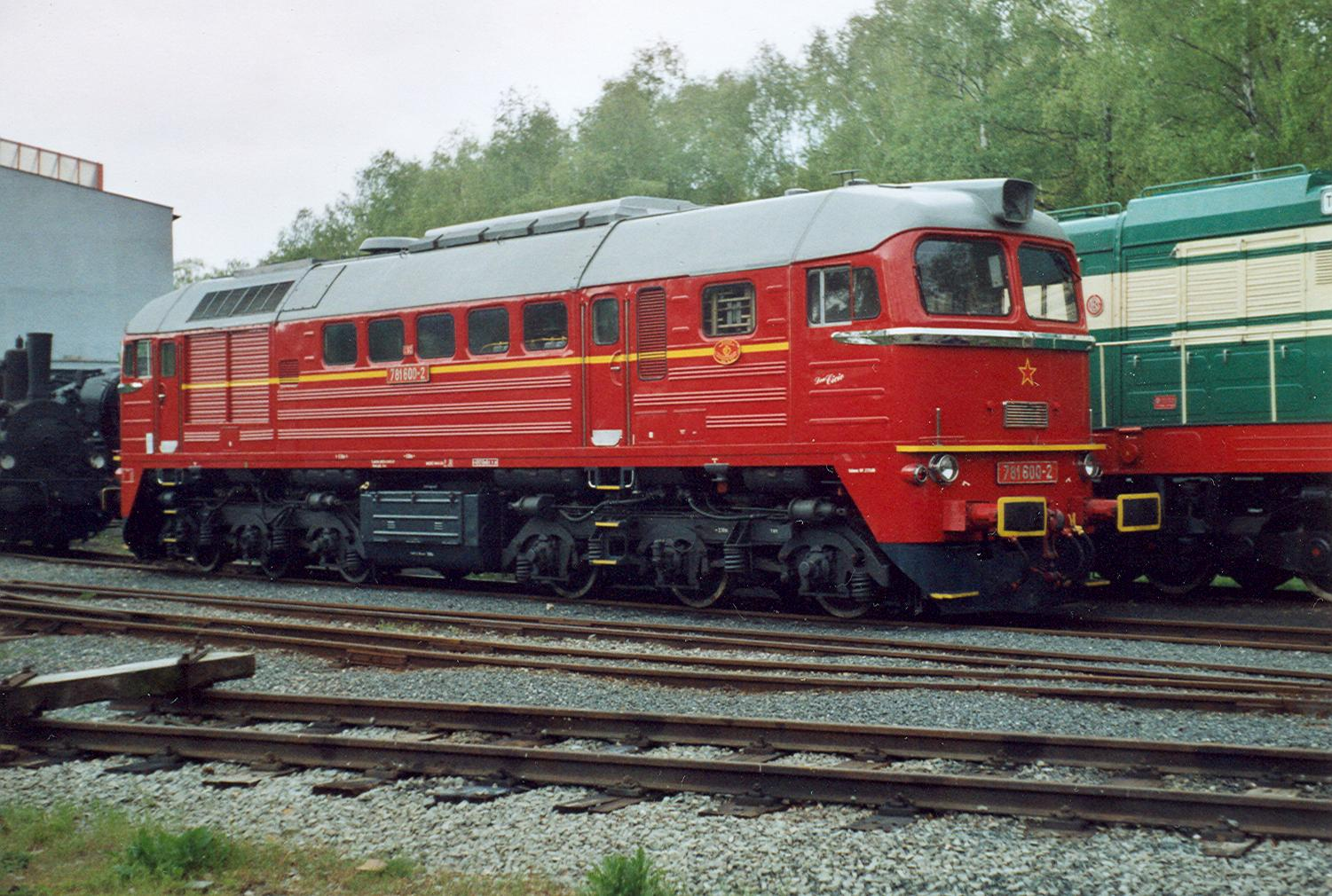 781 600 - 2 im Eisenbahnmuseum Lužna u Rakovníka